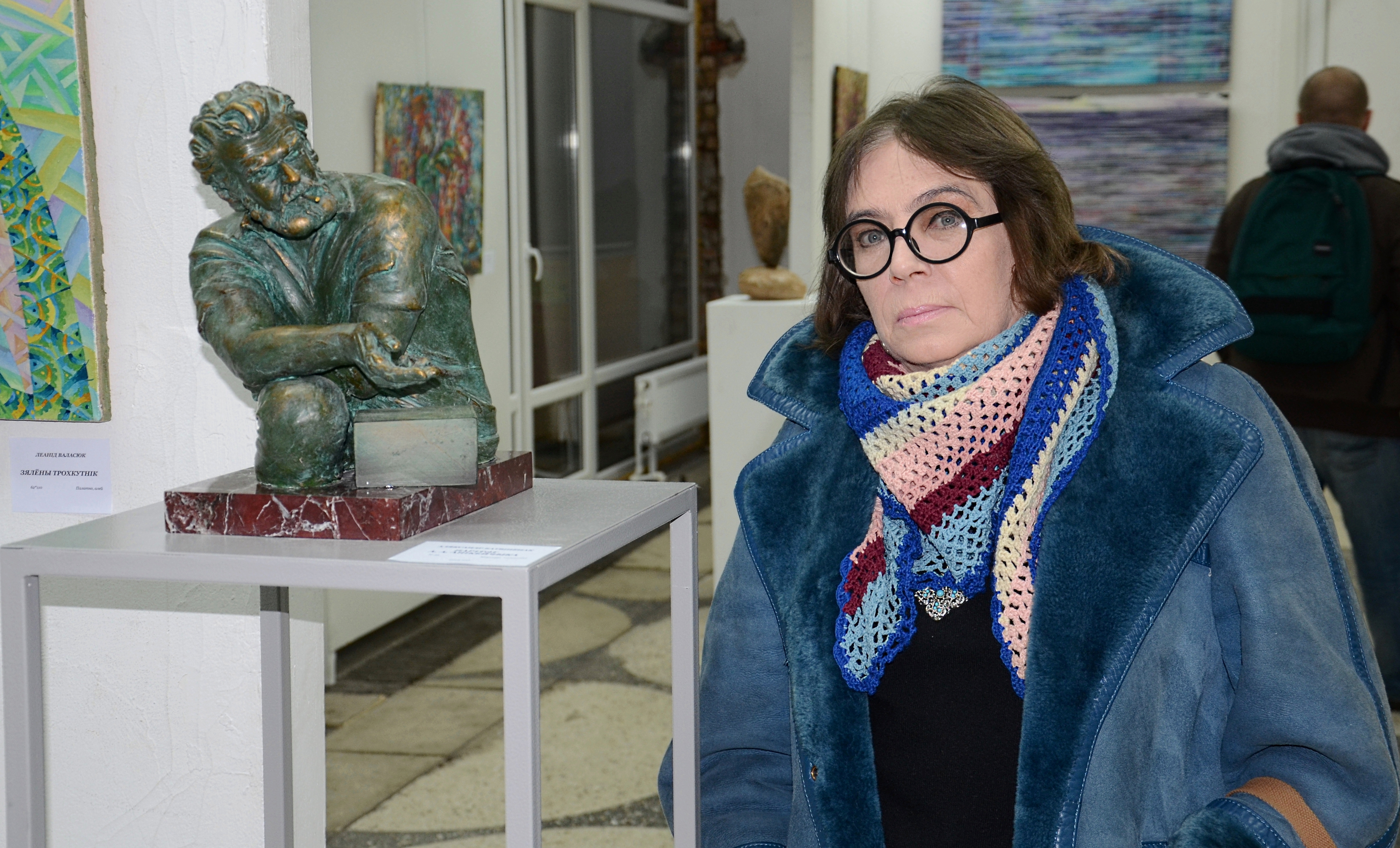 Белорусский сценарист Вера Савина на художественной выставке во Дворце искусств.